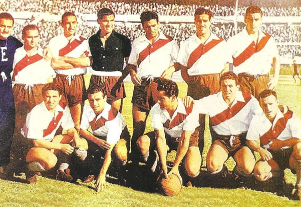 River campeón de 1945. Arriba: Yácono, Vaghi, Soriano, E. Rodríguez, Ramos y Rossi. Abajo: Muñoz, Gallo, Pedernera, Labruna y Loustau.